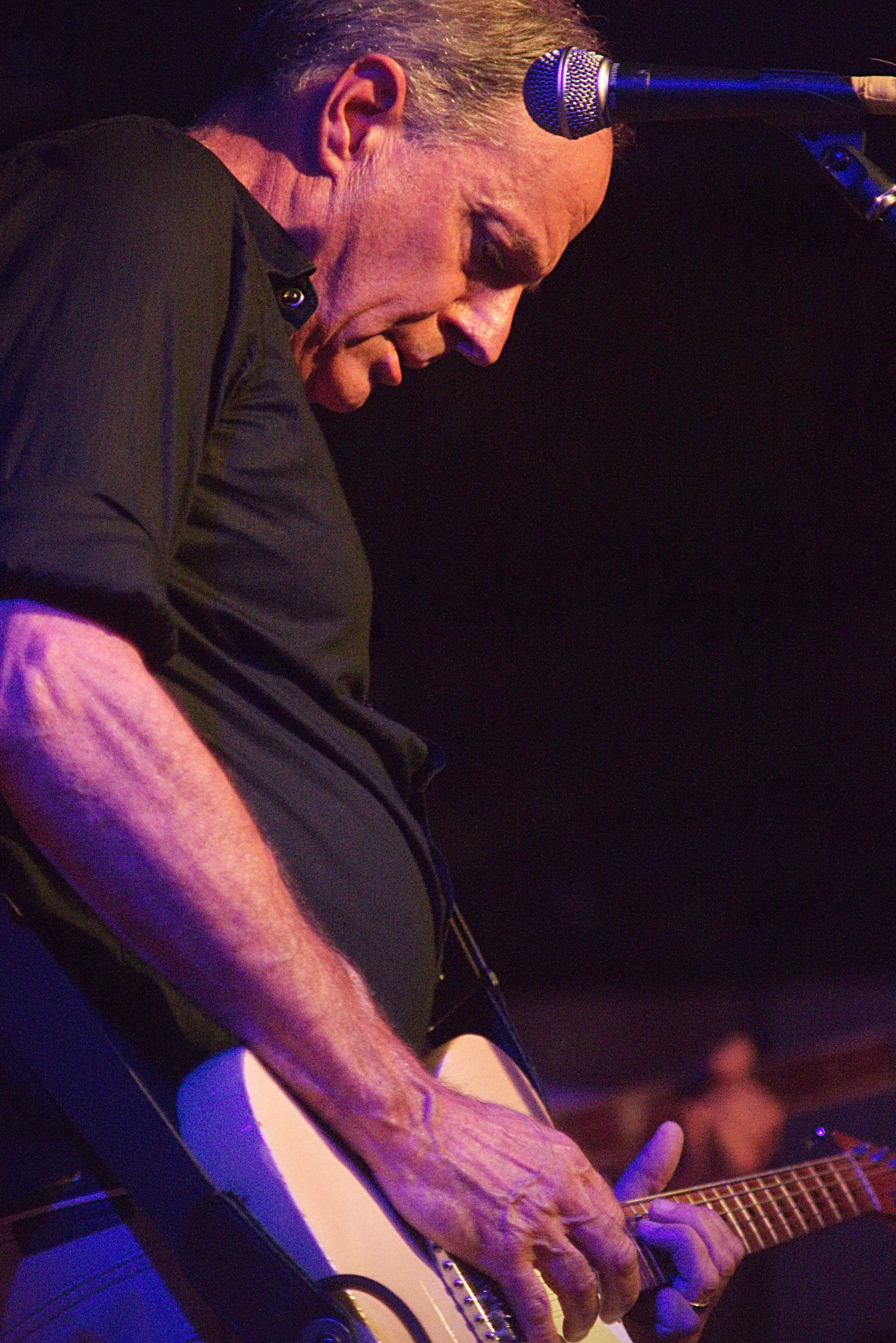 Tobin Sprout tijdens Barracuda 2017 in Austin, Texas